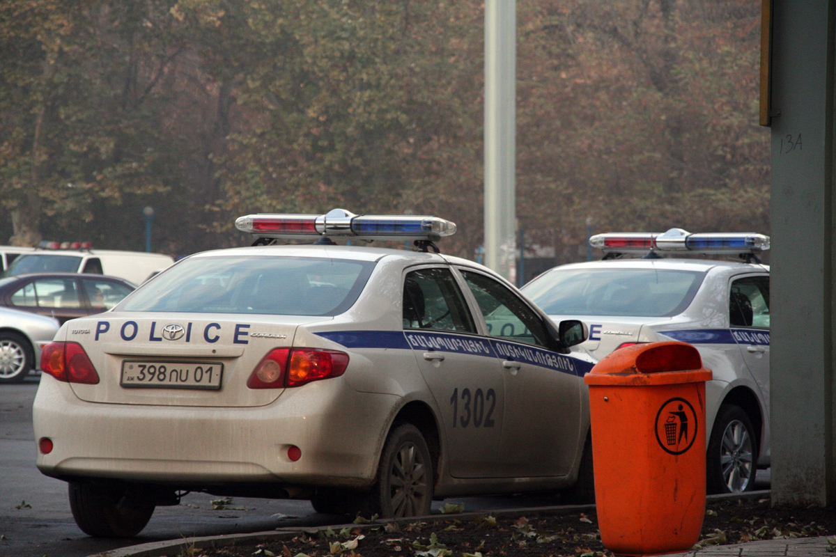 Police de la route - Arménie